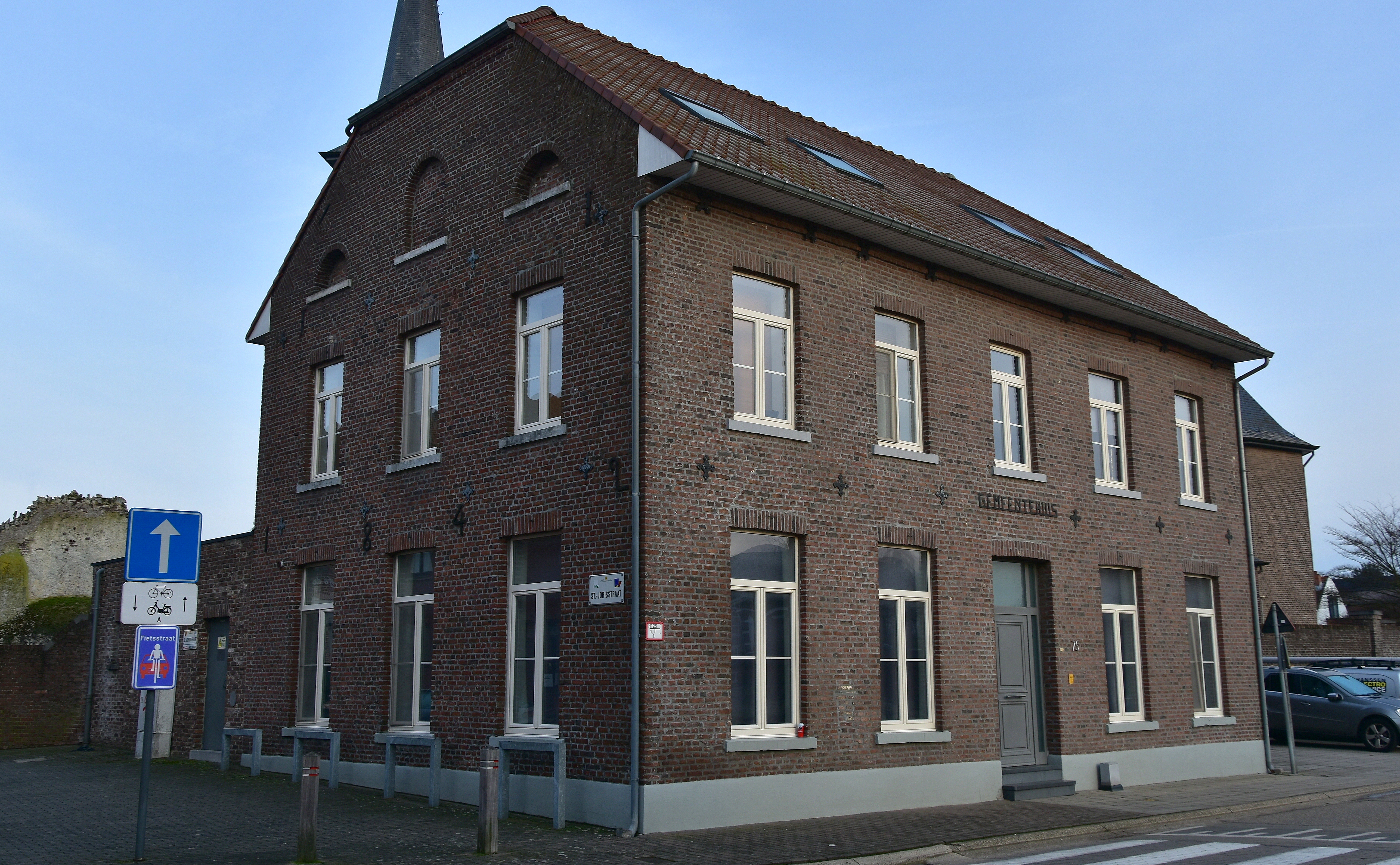 Voormalig gemeentehuis (1130) Boorsem 28-12-2019